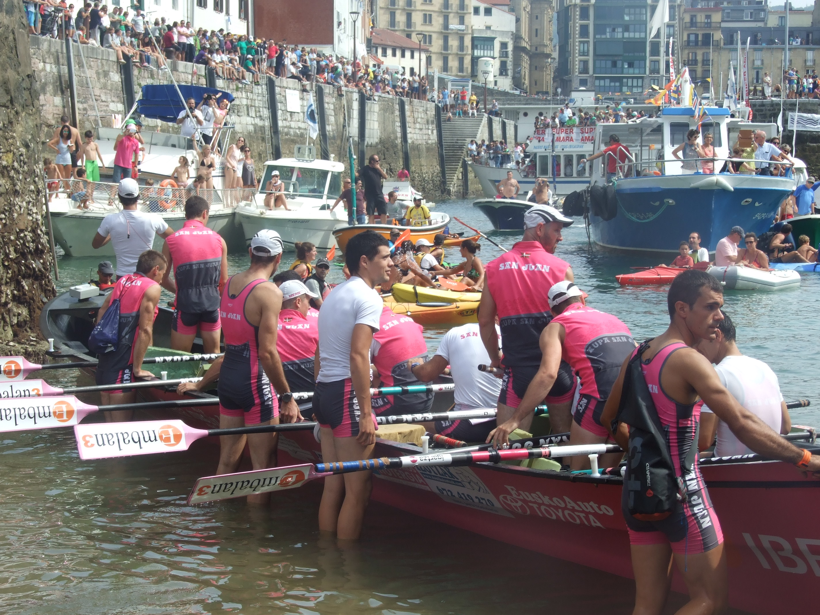 Bandera de la Concha 2016